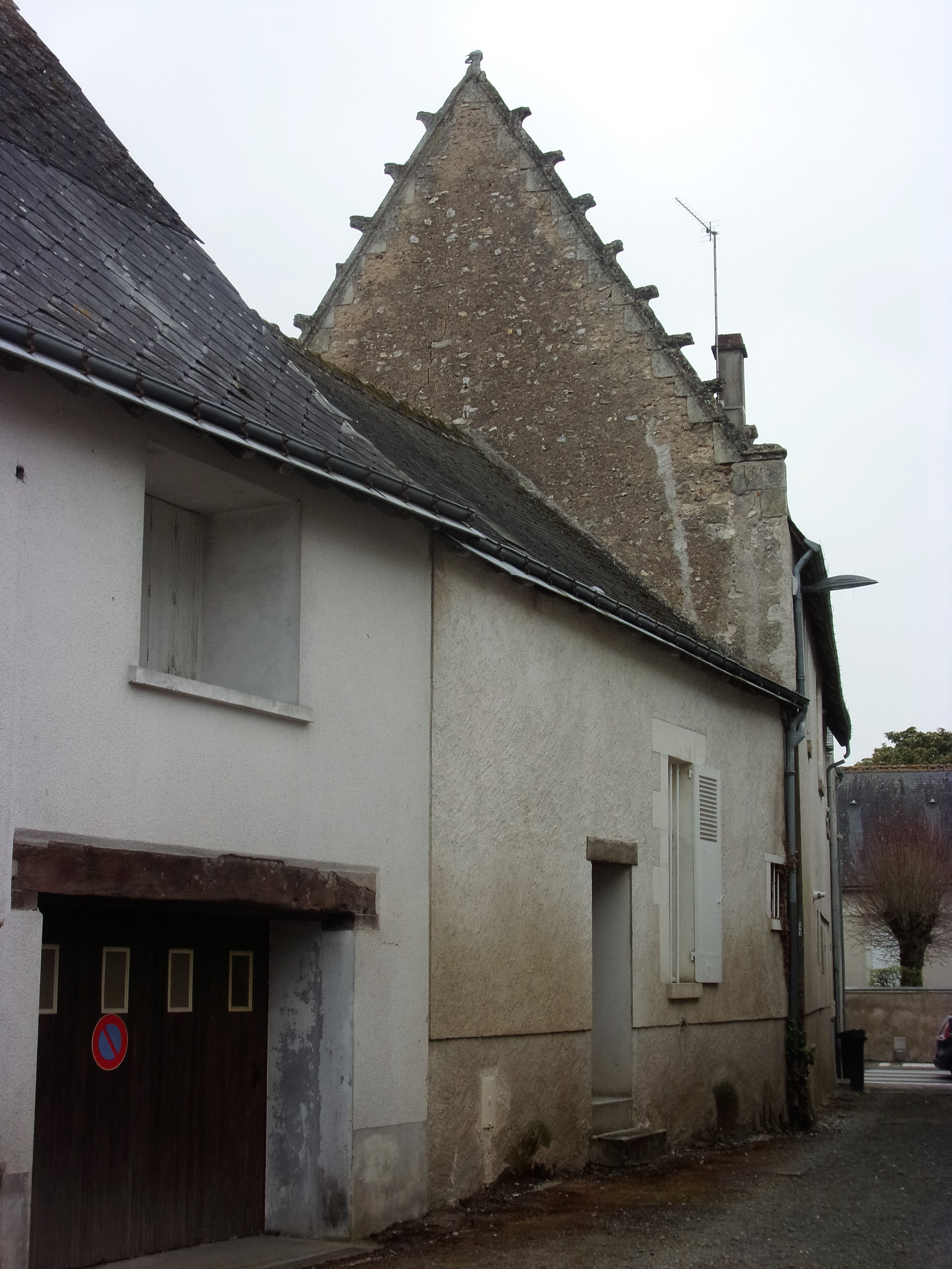 Bâtiment de l'ancien prieuré de Veigné